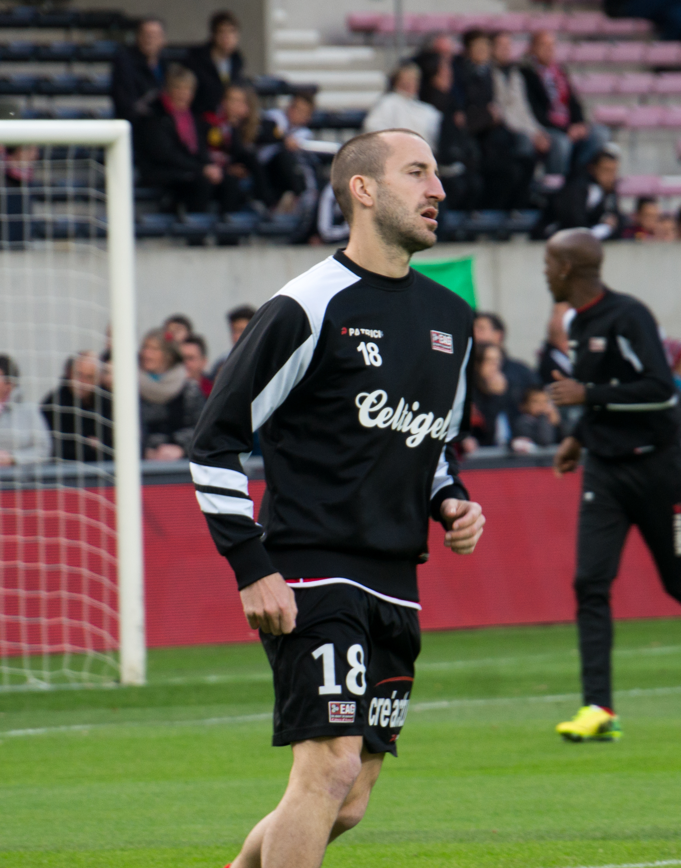 Guingamp - Toulouse 10 juin 2014